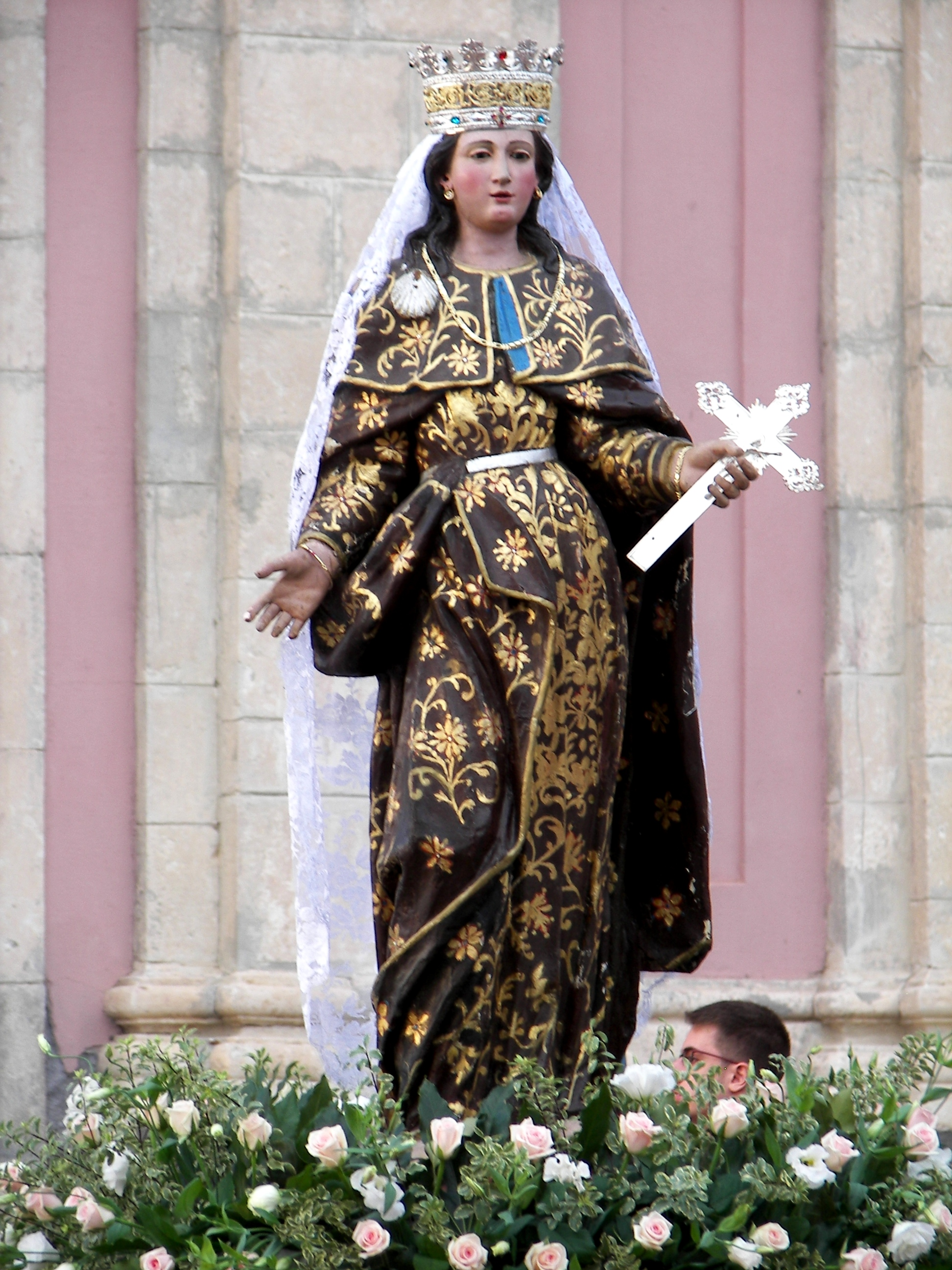 Autore e Fonte, Riccardo Spoto. Santa Rosalia venerata a Centuripe (En)